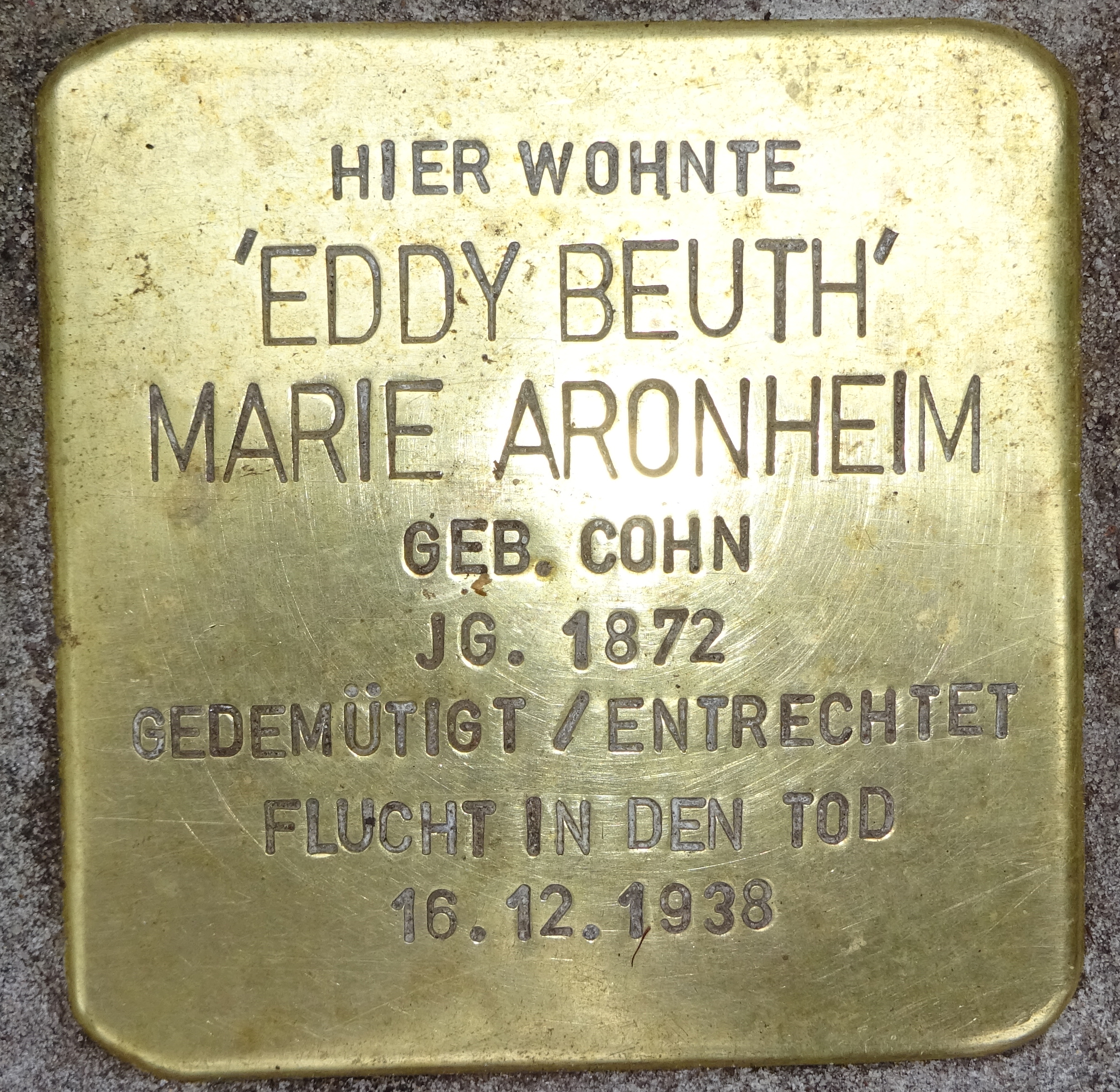 Stolperstein für Marie Aronheim, die unter dem Künstlernamen "Eddy Beuth" auftrat.